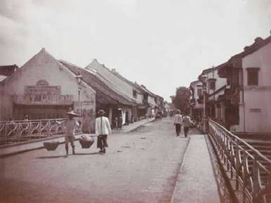 20世紀初印尼華人圖 (攝於1910年代)攝影者: 不明